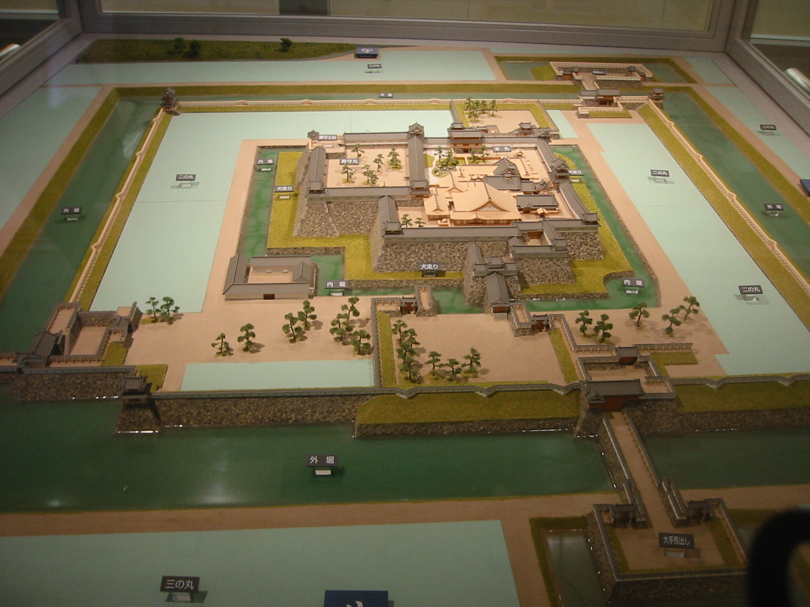 Model 篠山城復元模型